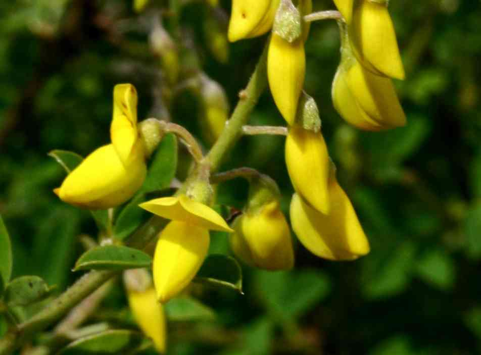 Cytisus nigricans (syn. Lembotropis nigricans; Citiso scuro) Giardino Botanico Alpino "Giangio Lorenzoni" (loc. Pian Cansiglio), Tambre d'Alpago (BL), quota 1000 m s.l.m.